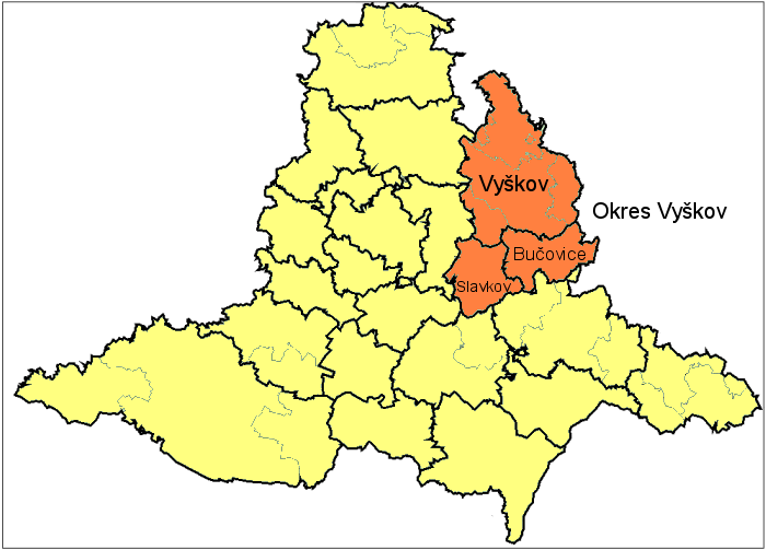 okres Vyškov (czech republic)